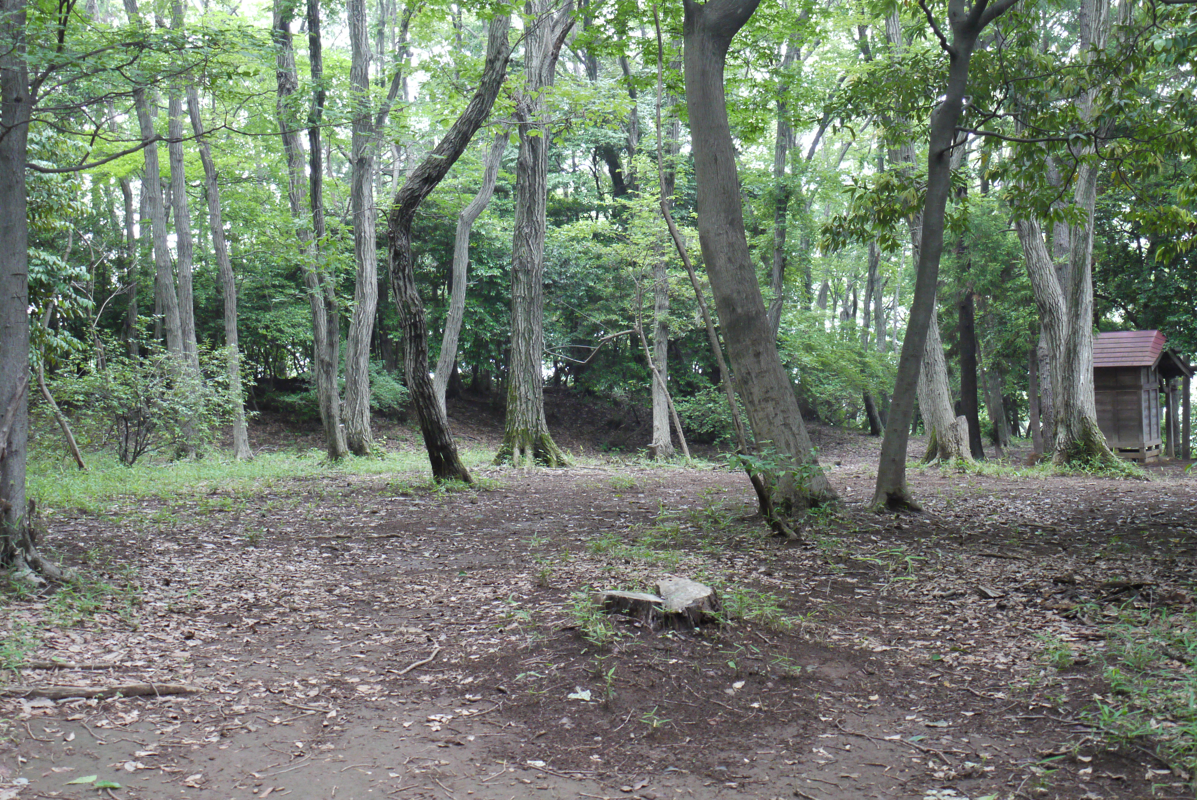 小野路城 主郭内部